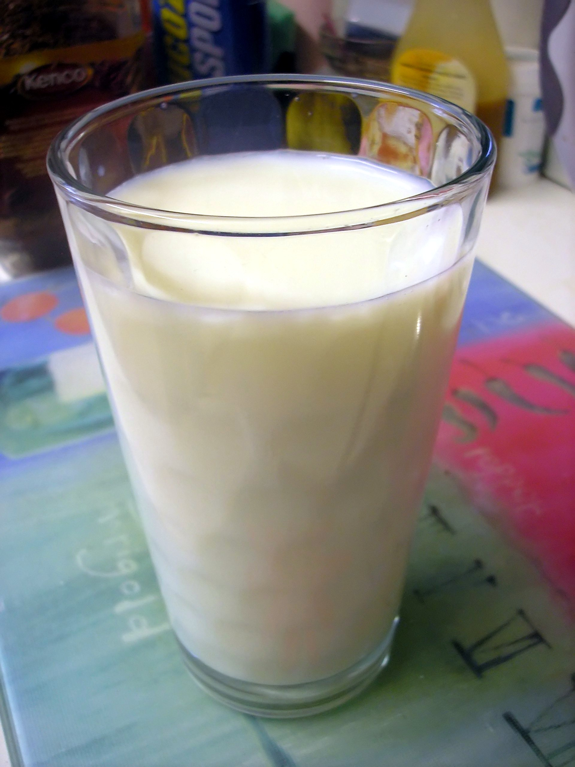 Espace Opéra Milk